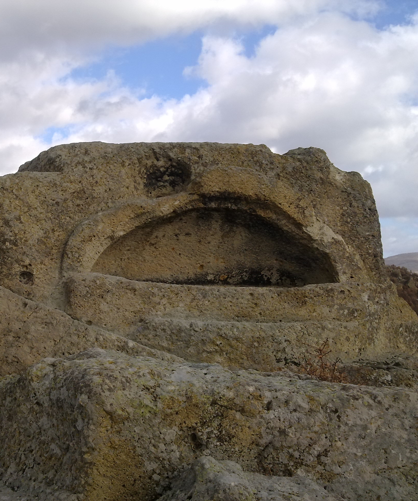 Каменен саркофаг на тракийския светец Орфей край село Татул